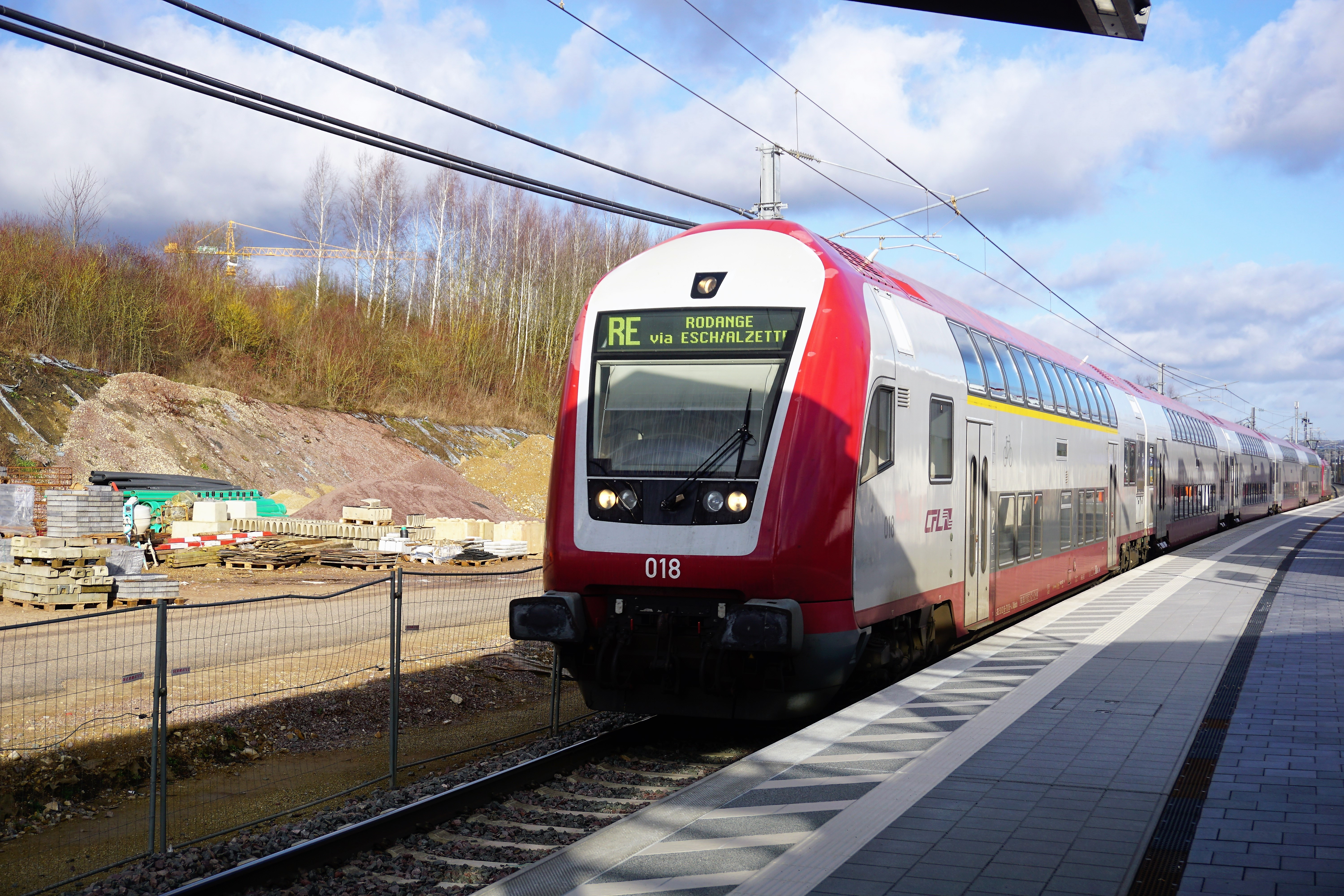 La halte "Howald" des CFL. Le train vers Esch-Alzette - Rodange entre en gare sur la voie 1.